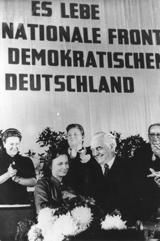 ADN-ZB/Donath Gründung der Deutschen Demokratischen Republik am 7.10.1949 Im Gebäude der DWK (Deutsche Wirtschafts-Kommission) in der Leipziger Strasse in Berlin fand am 7.10. die 9.Tagung des Deutschen Volksrates statt, auf der die DDR gegründet und das Manifest "Die Nationale Front des demokratischen Deutschland" verabschiedet wurde. UBz.: Die jüngste Abgeordnete der Volkskammer, Margot Feist, beglückwünscht Wilhelm Pieck zu seiner Wahl als Staatspräsident. Abgebildete Personen: Pieck, Wilhelm: Präsident, Politbüro der SED, Vorsitzender der KPD, DDR (GND 118594273) Feist, Margot: Siehe: Honecker, Margot (GND 122782933)